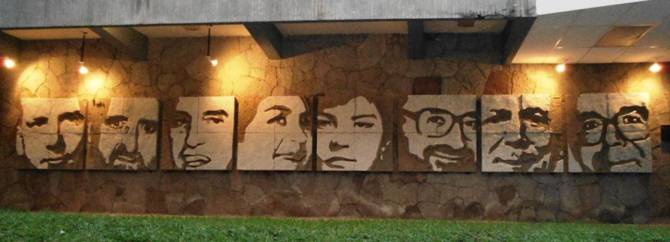 Mural de los martires del UCA